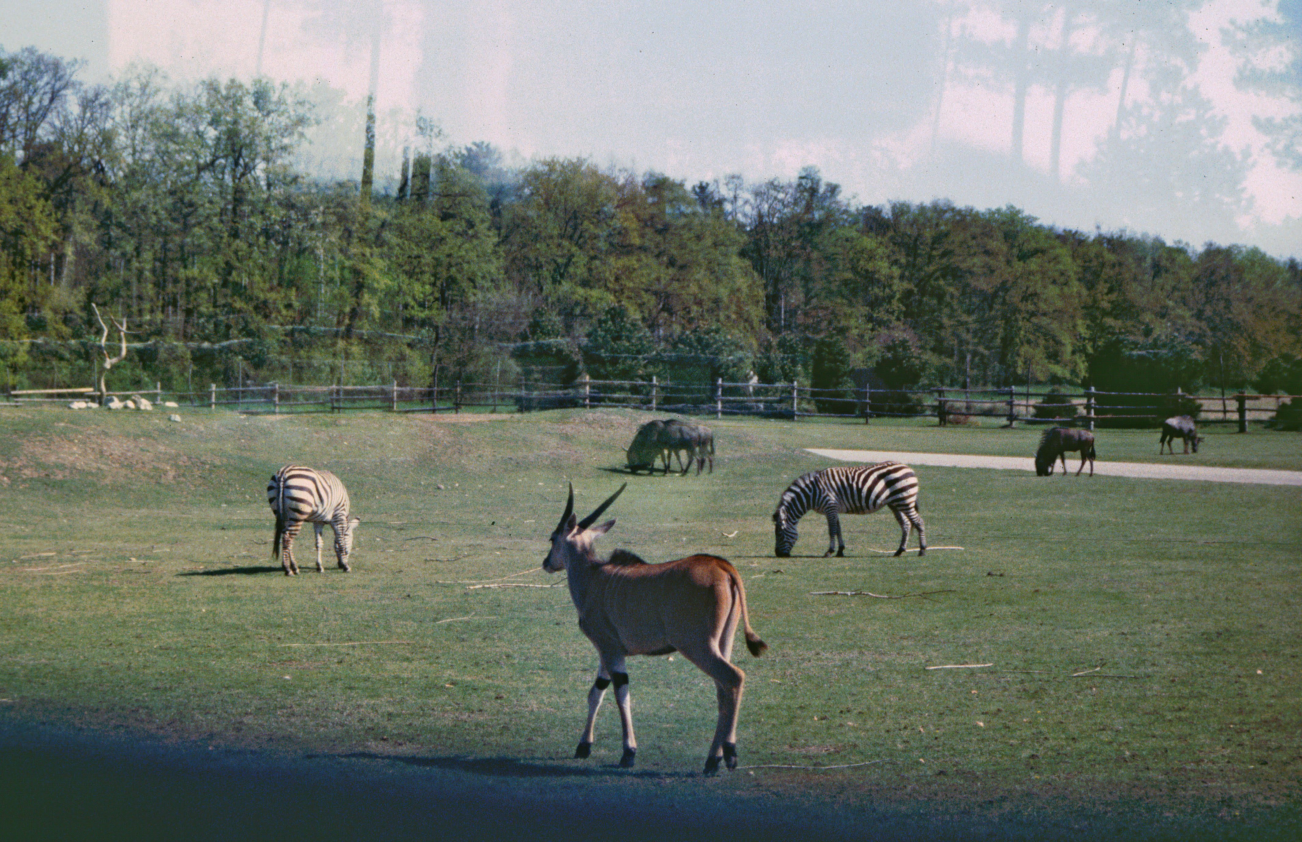 Der ehemalige Safaripark Gänserndorf, Antilopen und Zebras